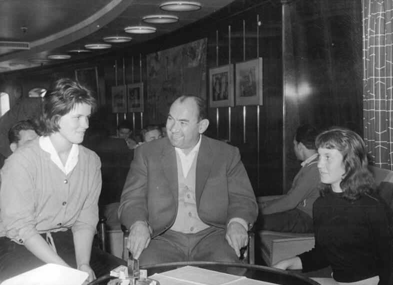 Zentralbild Brüggmann-11.7.1960 Die besten Jugendbrigaden und Lehrlingskollektive auf der Völkerfreundschaft. Die besten Jugendbrigaden und Lehrlingskollektive, die in einer Festveranstaltung in Rostock ausgezeichnet wurden, unternahmen anschließend an diese Auszeichnung eine zweitägige Ostseerundfahrt. Als Gäste fuhren unter anderen der Schriftsteller Ludwig Turek und der Neuerer Günter Christoph mit. Der Minister für Volksbildung, Proffessor Dr. Lemmnitz, der ebenfalls unter den Passagieren war, ließ sich in persönlichen Ansprachen und bei einem großen Erfahrungsaustausch aus der Arbeit der Brigaden und Lernkollektiven berichten. Aber auch Sport, Tanz und Unterhaltung kamen nicht zu kurz, so daß für alle Jugendlichen diese Ostseerundfahrt ein gewaltiges Erlebnis wurde. UBz: Minister Prof. Dr. Lemmnitz bei einer Aussprache mit zwei Lehrlingen aus der LPG Oppin-Maschwitz (Halle).